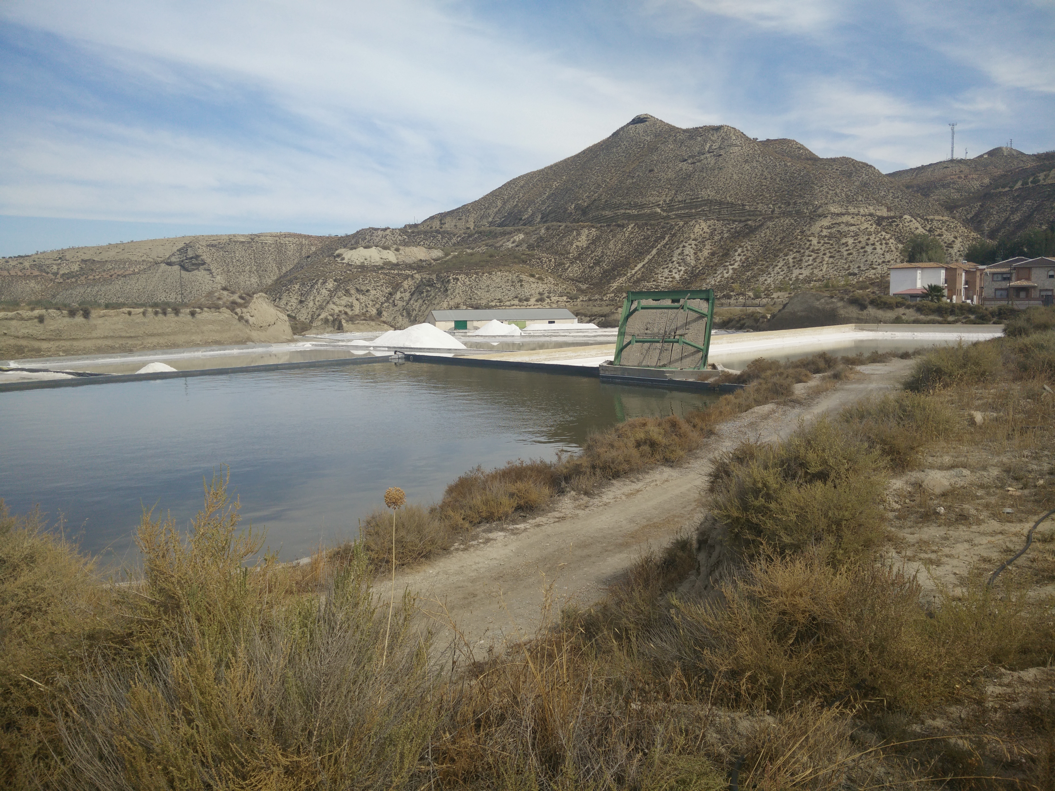 Salinas actualmente.